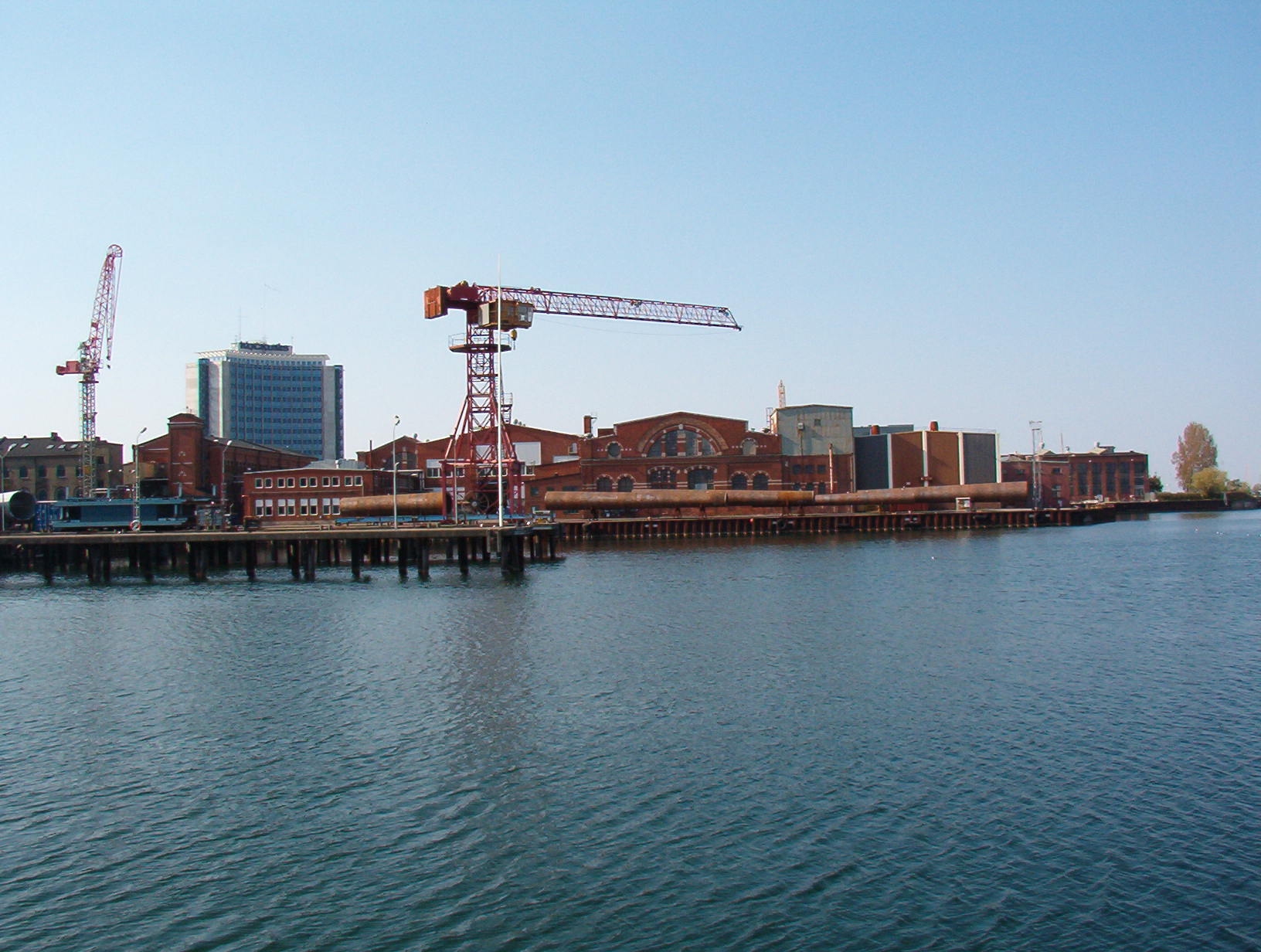 Kockums AB